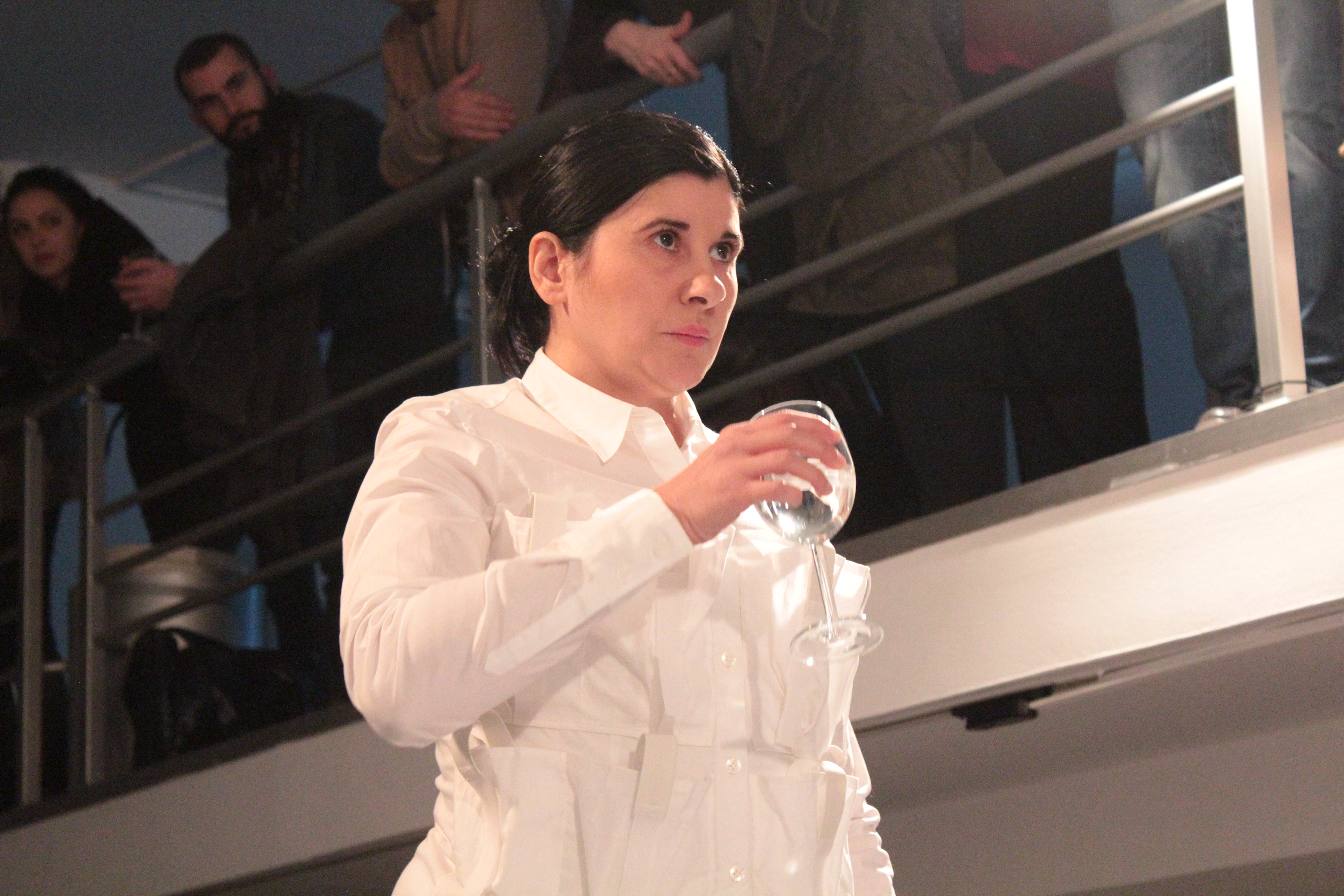 Nezaket Ekici - Performance "Floating ourselfs" at Siemnes Sanat in Istanbul